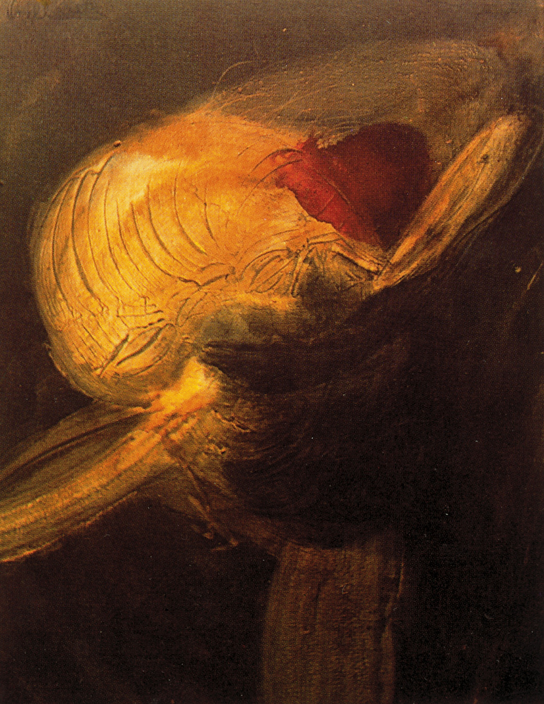 Nino_Convulsionado